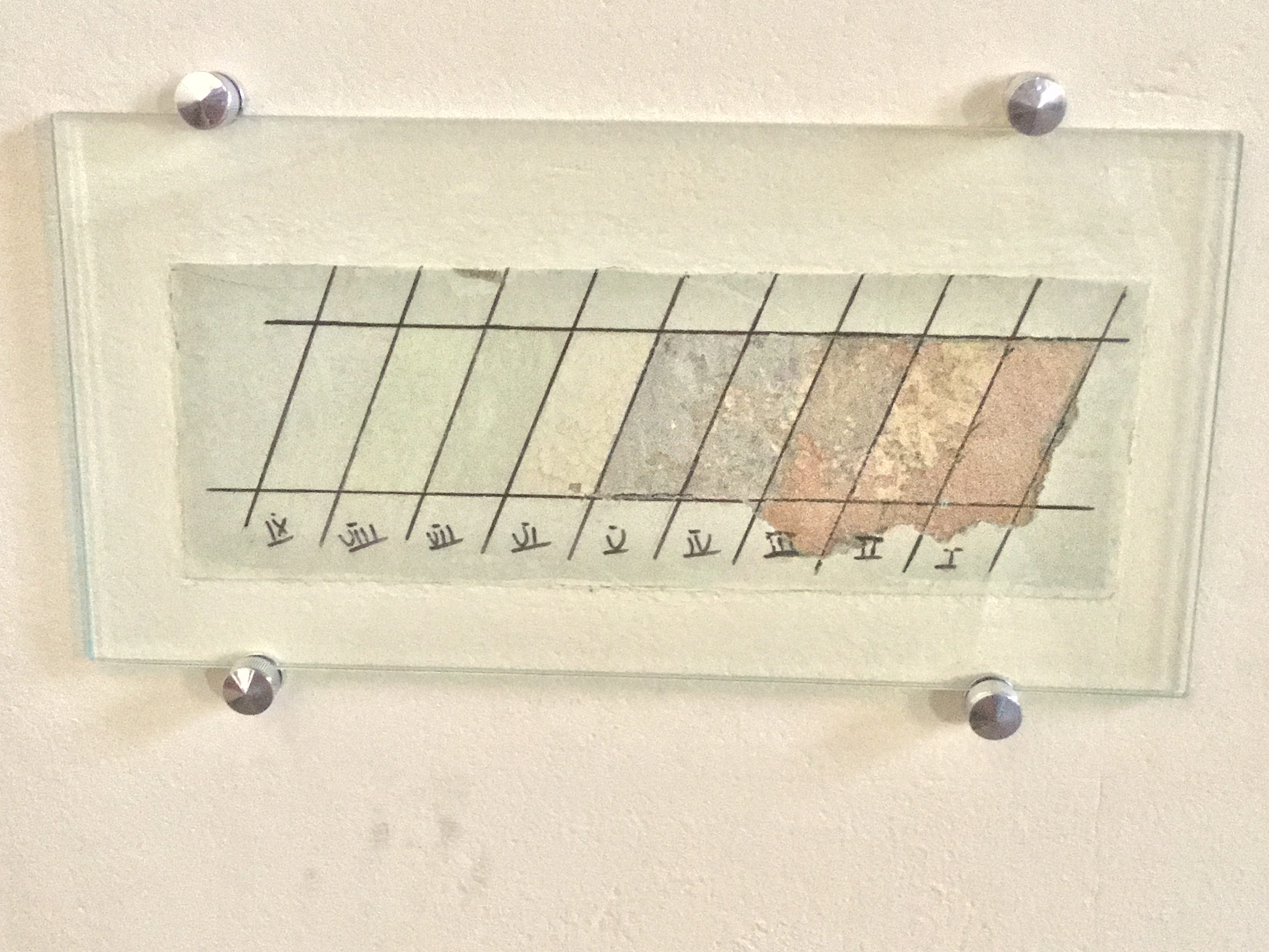 Estudo de camadas das paredes internas da Igreja Luterana Martin Luther, no Largo do Paissandu (São Paulo-SP, Brasil), realizado durante a restauração do edifício, onde foram identificadas várias pinturas usadas no local.